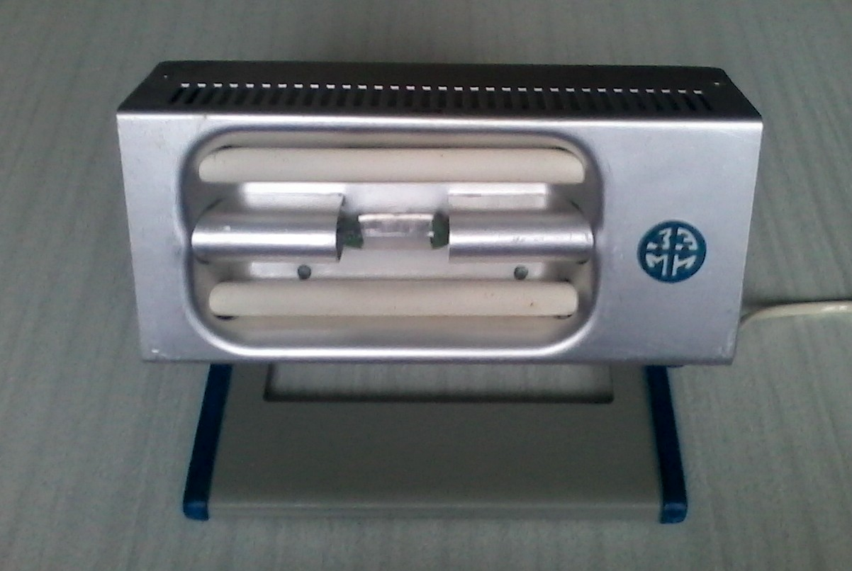 Знято мобілкою Самсунг